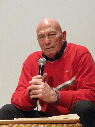 צבי ינאי בהרצאה. צילום: דליה הוכברג